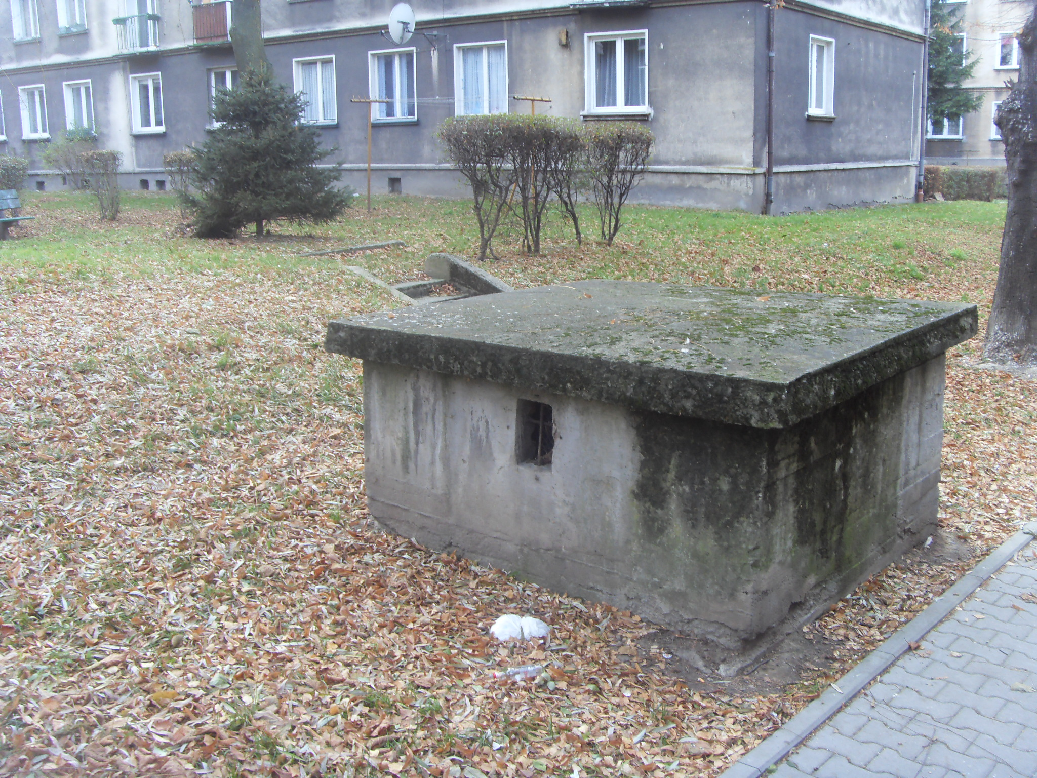 Osiedle Grunwaldzkie w Bielsku-Białej